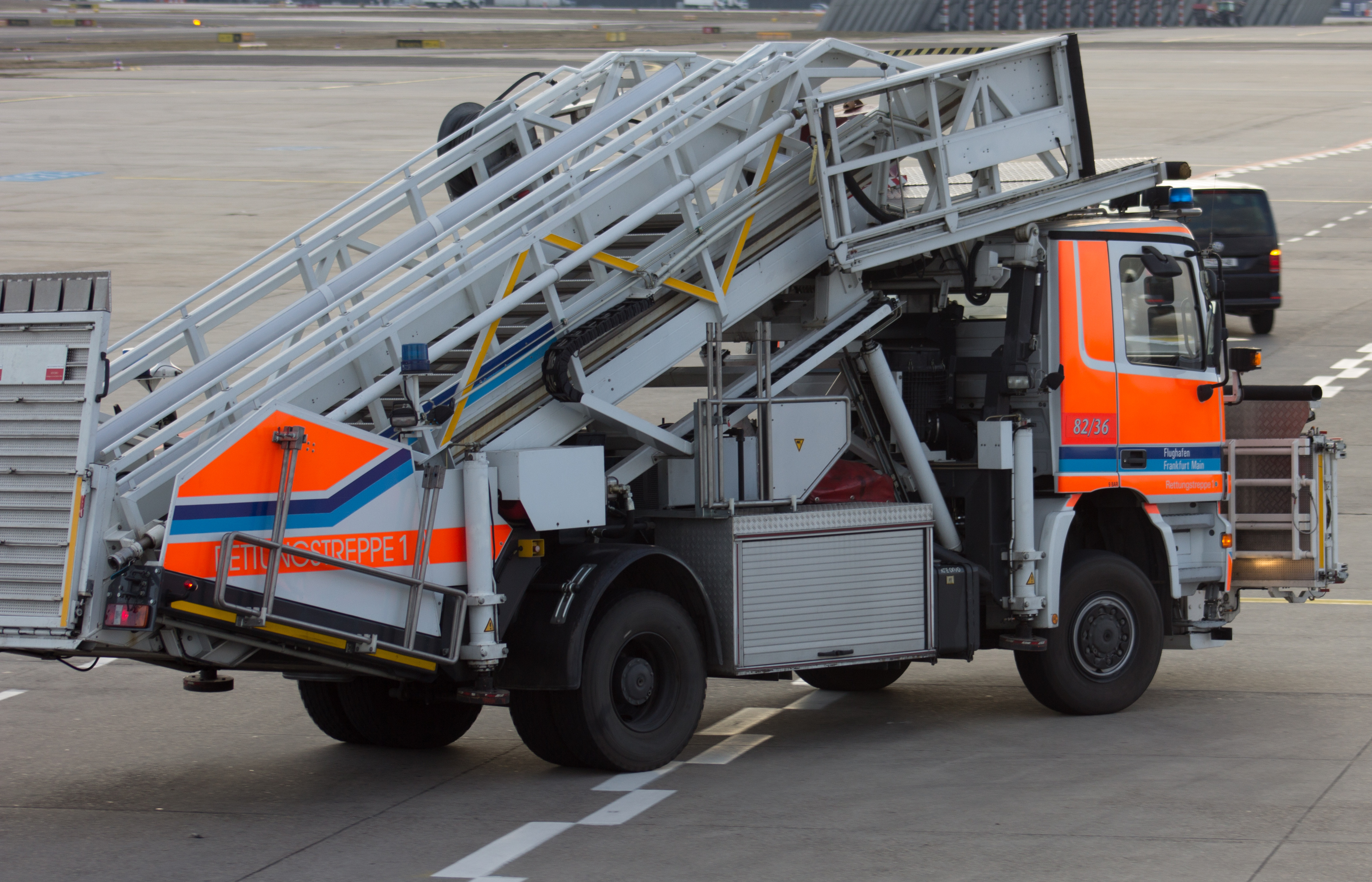 Ankunft der deutschen Olympiamannschaft am 26. Februar 2018 mit Flug LH713 auf dem Frankfurter Flughafen.